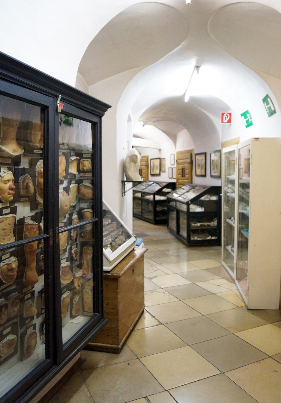 Gang mit Schaukästen im Narrenturm, 2012